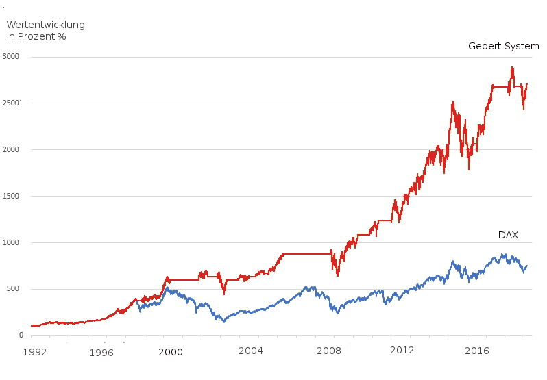 Entwicklung des DAX und Vermögenszuwachs nach dem Gebert-System von 1992 bis 2019